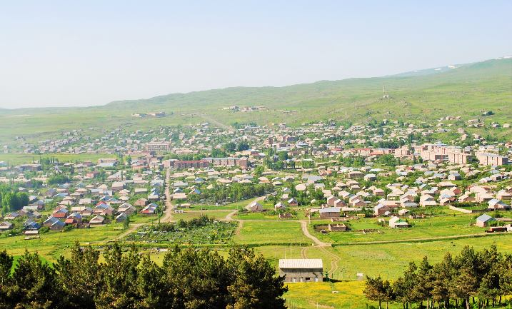 Ապարան